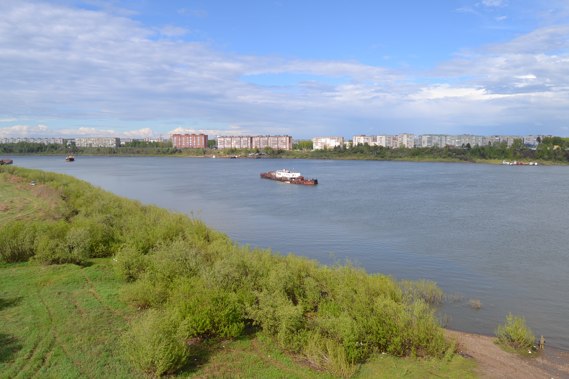 Г.Северск